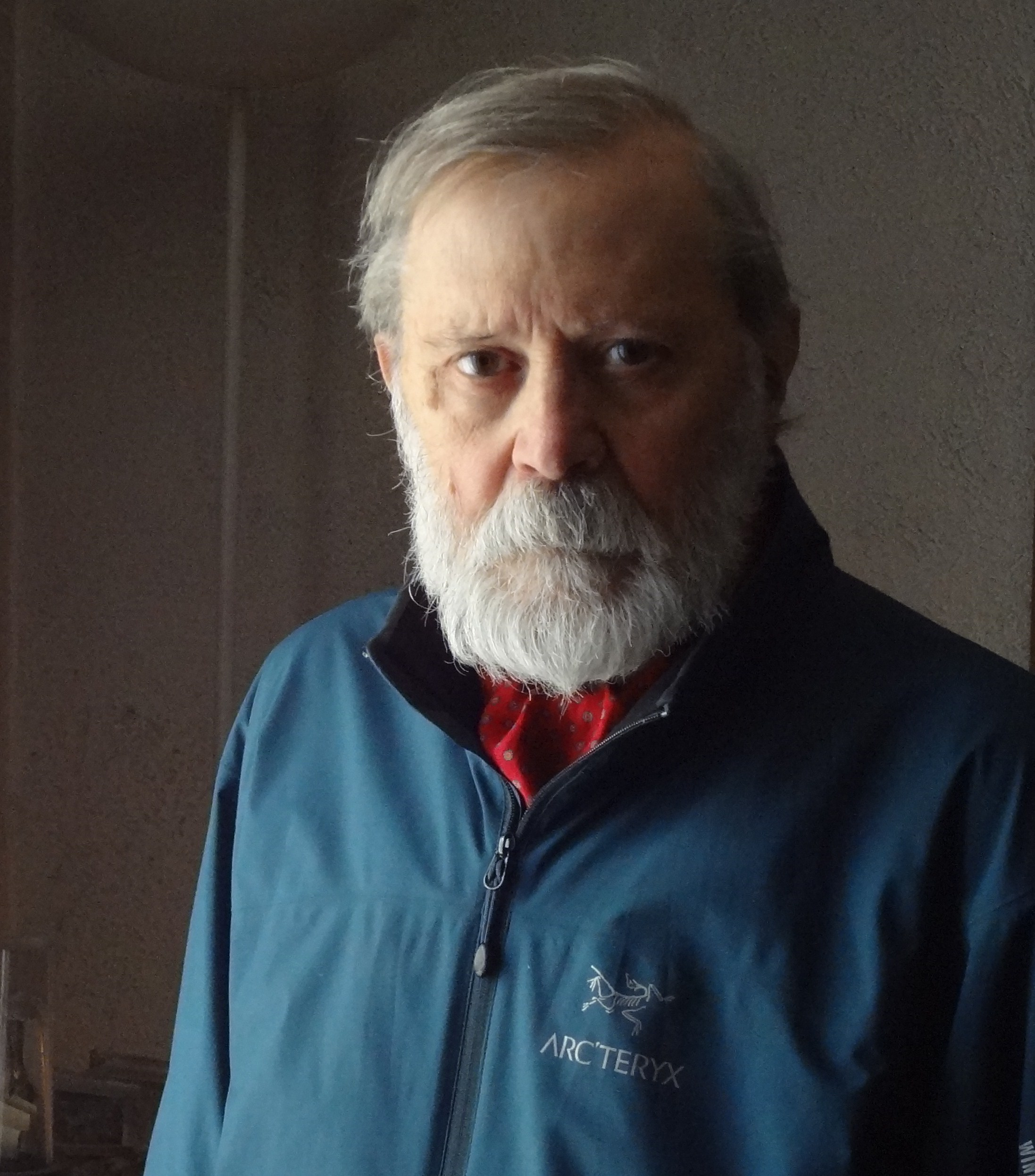 Ischia nel gennaio del 2012